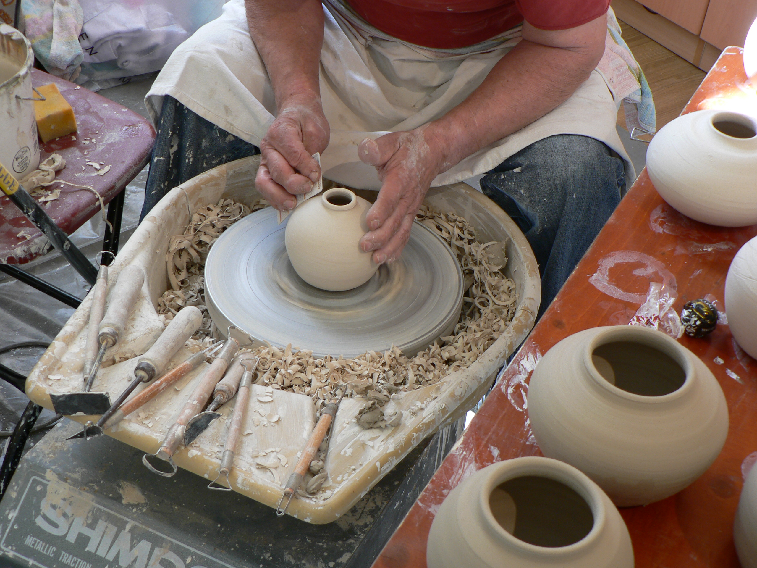 pottery disc